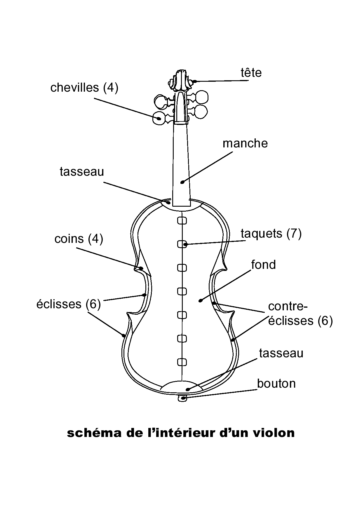 Schéma de l'intérieur d'un violon